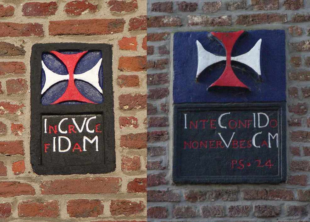 Chronogramme an der Südseite und dem Ostgiebel des Laienbrüderhauses, Haus Hohenbusch Erkelenz